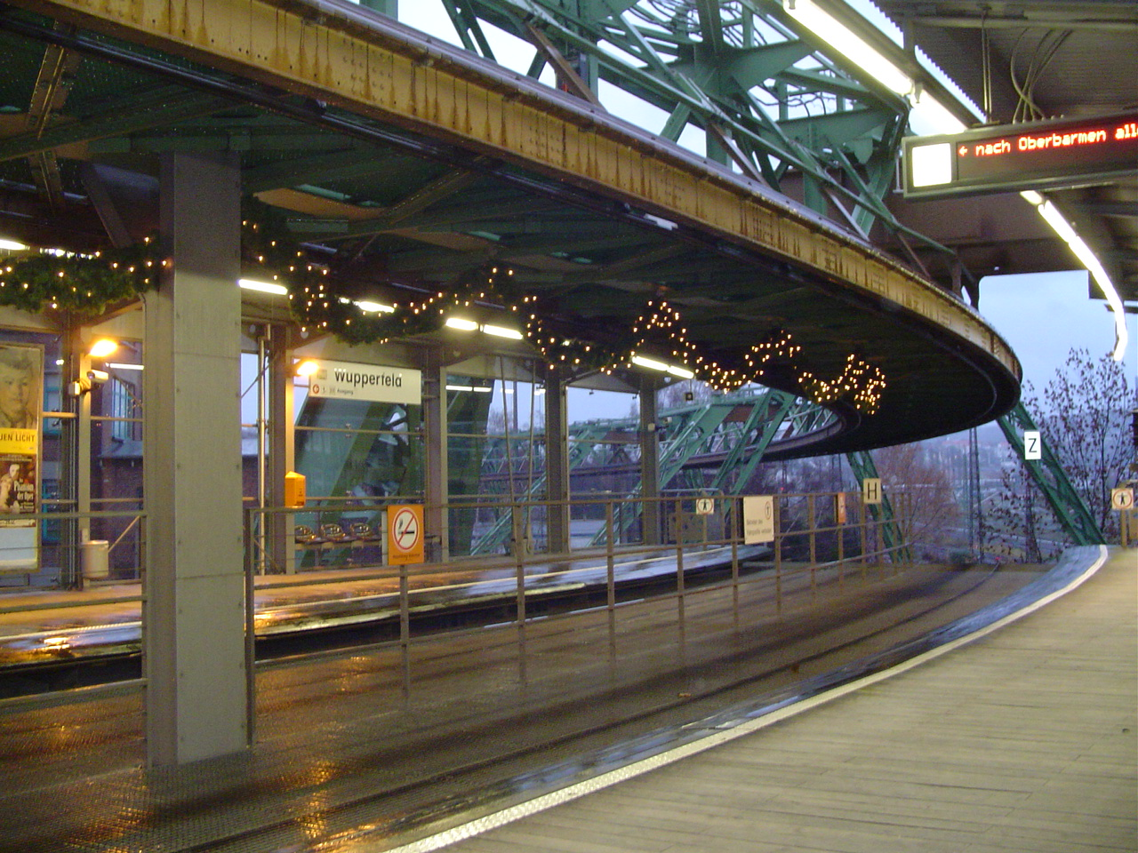 Station Wupperfeld der Wuppertaler Schwebebahn